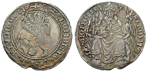 Italia, Bologna. sotto i Bentivoglio. 1446-1506. AR Grossone (3.10 g). San Petronio in trono di fronte, tiene il modello della città ed il bastone pastorale. S. PETRONIVS DE BONONIA Lione rampante sin., tiene stendardo. Stemma davanti. Intorno BONONIA MATER STVDIORVM Italy, Bologna. Under the Bentivoglio. 1446-1506. AR Grossone (3.10 g). St. Petronius seated, holding model of city and crozier. S. PETRONIVS DE BONONIA Lion advancing left, holding pendant; arms before. BONONIA MATER STVDIORVM CNI X pg. 41, 33; Biaggi 395.